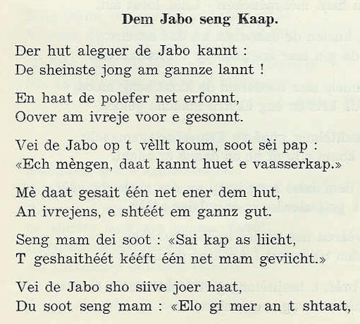 Sujet:Batty Weber (1860-1940): Dem Jabo seng Kaap (Ufank) an der Schreifweis vun 1946. Source:Eegene Scan vum User:Cornischong